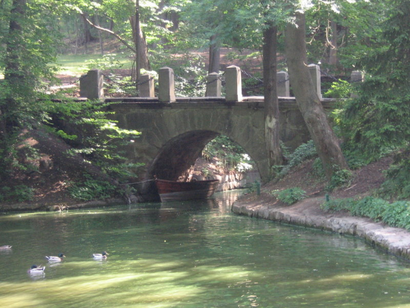 Венецианский мост.